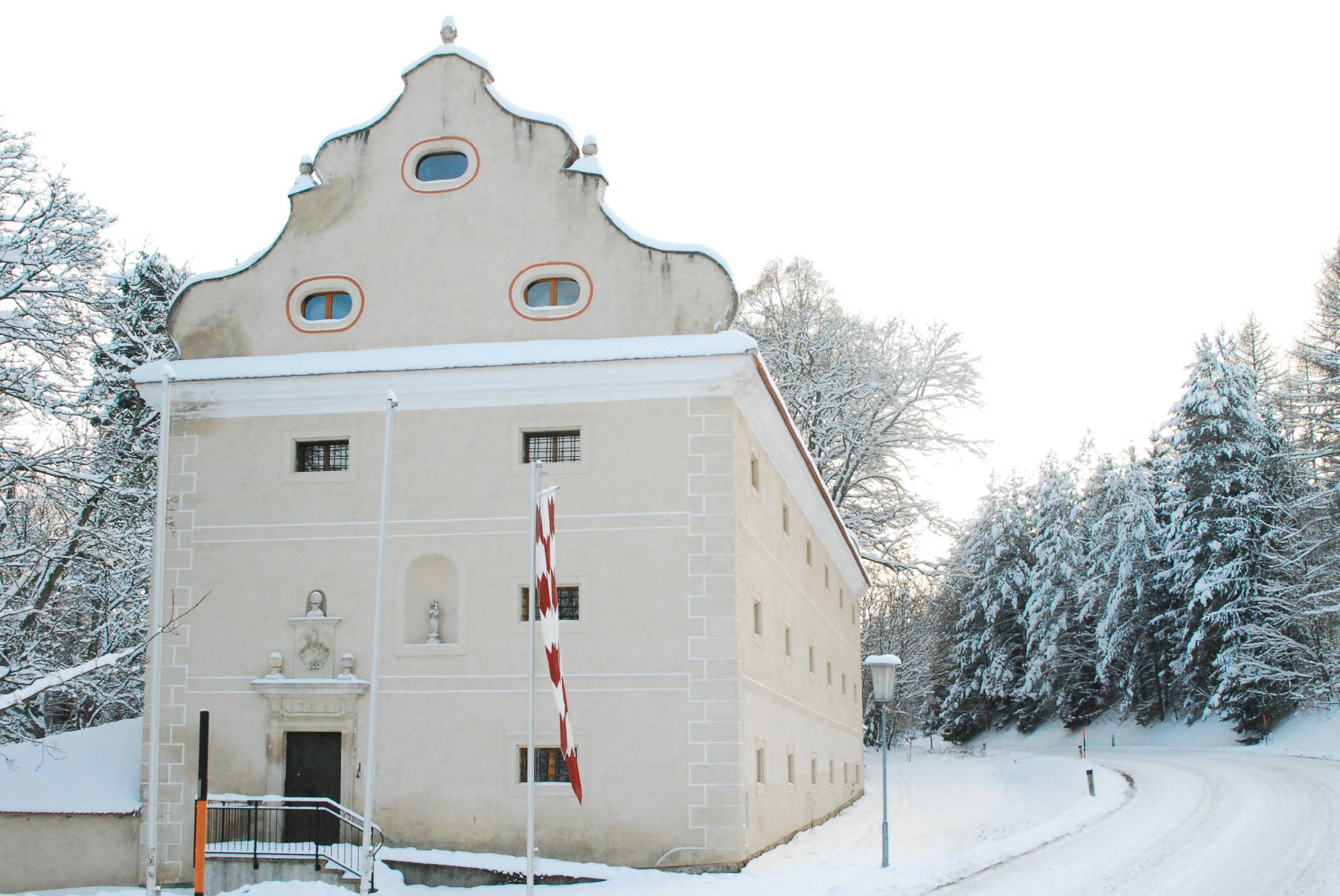 Schüttkasten in Primmersdorf bei Geras